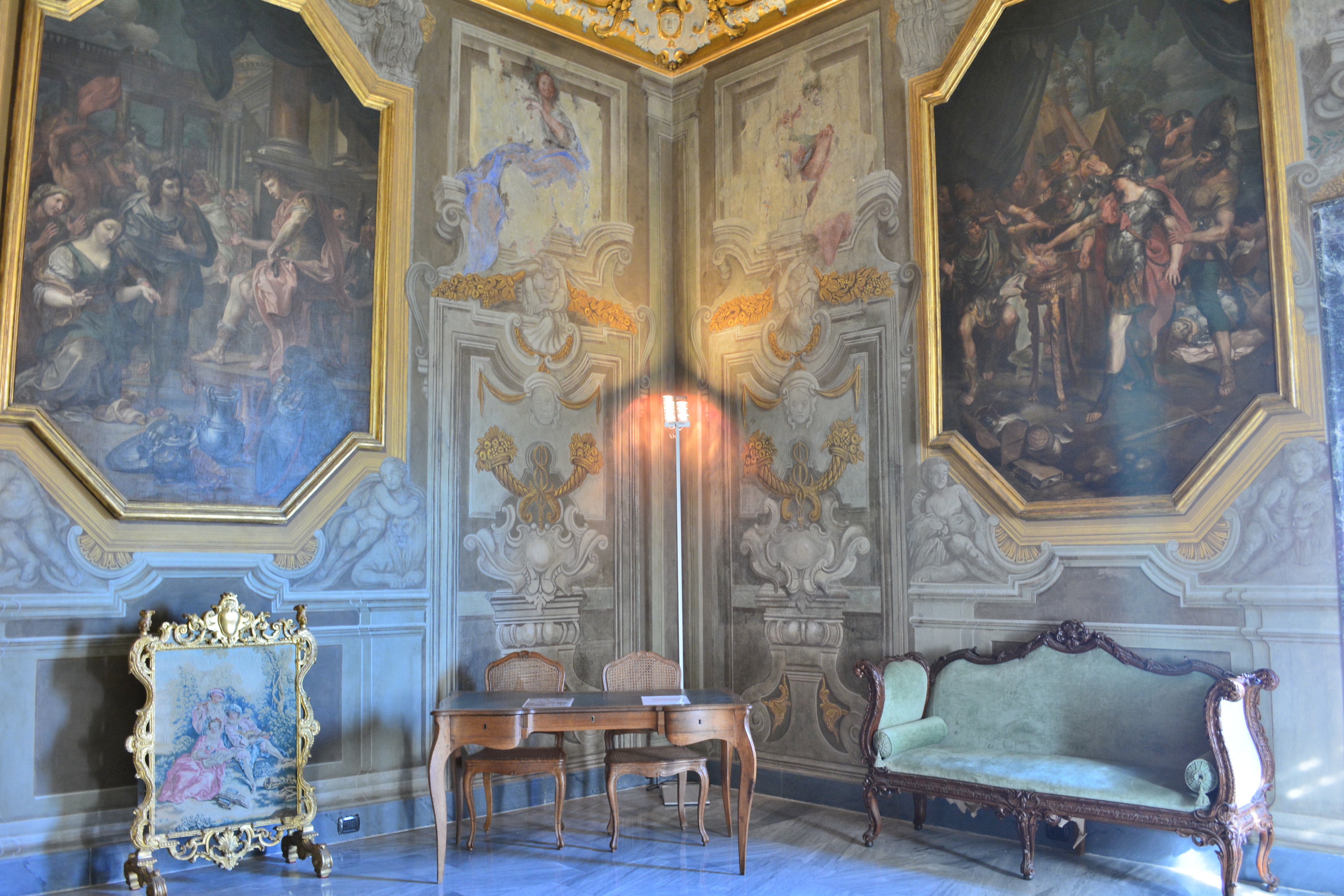 Palazzo Rosso - Musei di Strada Nuova This is a photo of a monument which is part of cultural heritage of Italy.